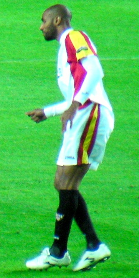 Sevilla-Rangers: Kanouté bailando